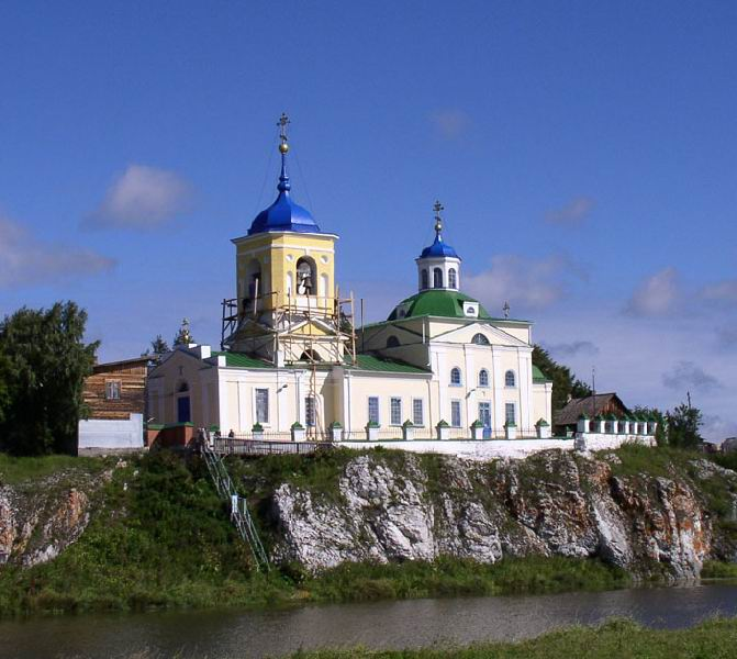 Белокаменный храм во имя Св. Георгия победоносца в Уткинской слободе (село Слобода Первоуральского района Свердловской области).